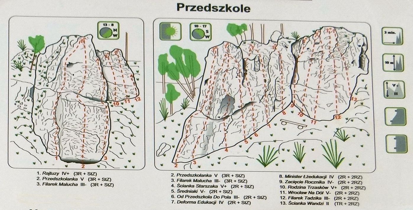 Topo skały Przedszkole w masywie Łabajowej w Dolinie Będkowskiej